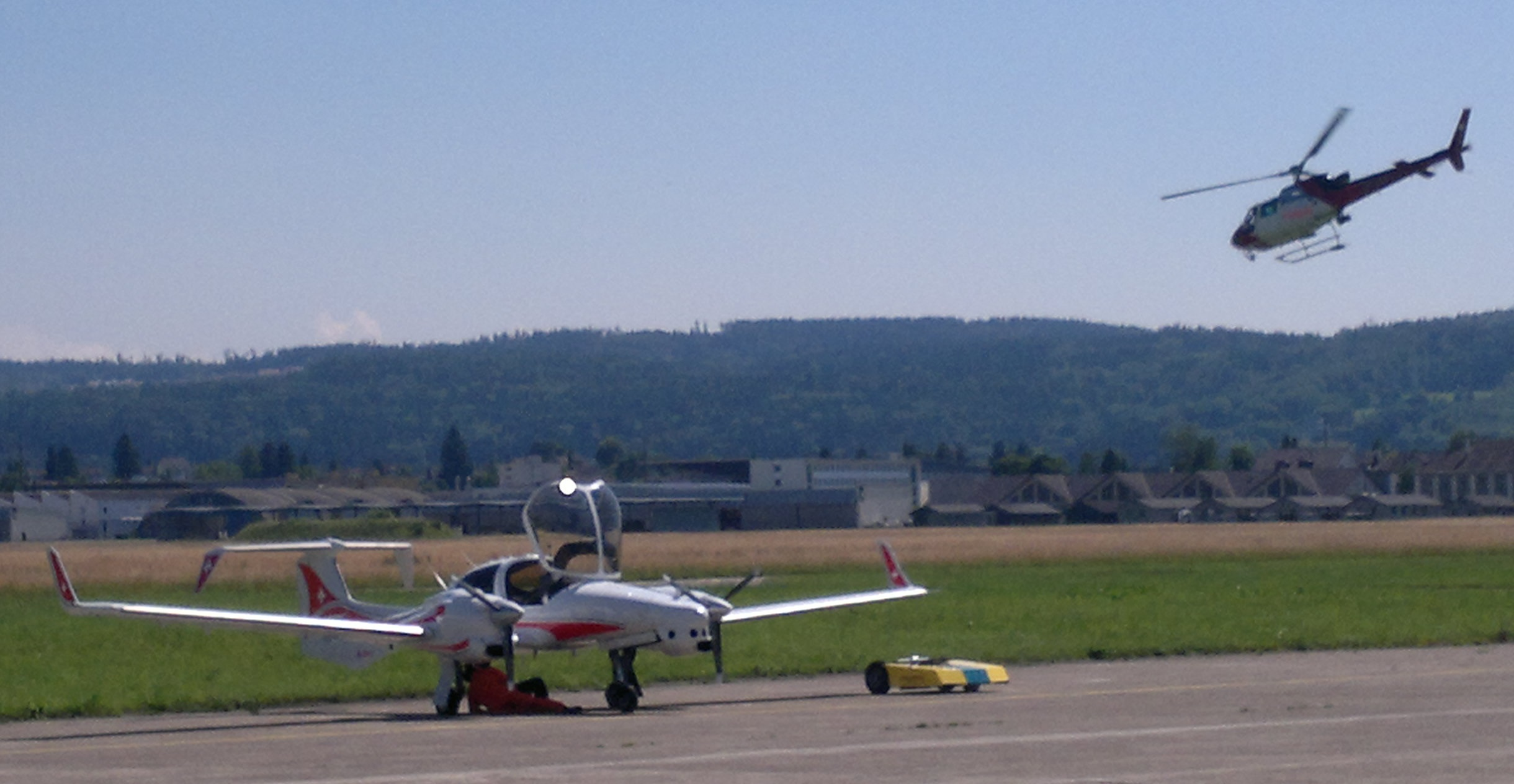 Swiss Air Force Armasuisse, Diamond DA42 Centaur OPA, R-711, durch Aurora Flight Sciences modifiziertes Optionally Piloted Vehicle